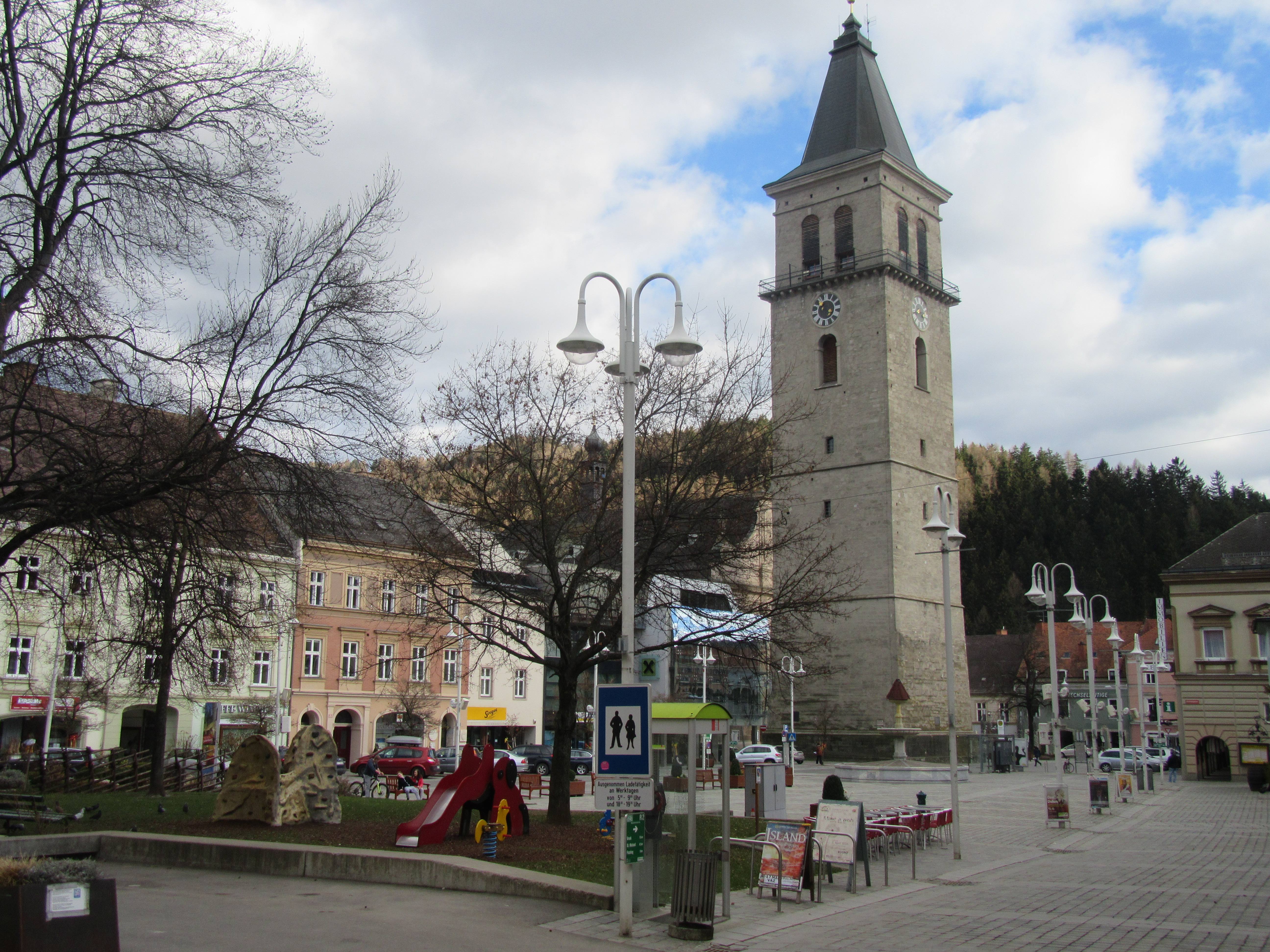 Stadtturm Judenburg, Austria